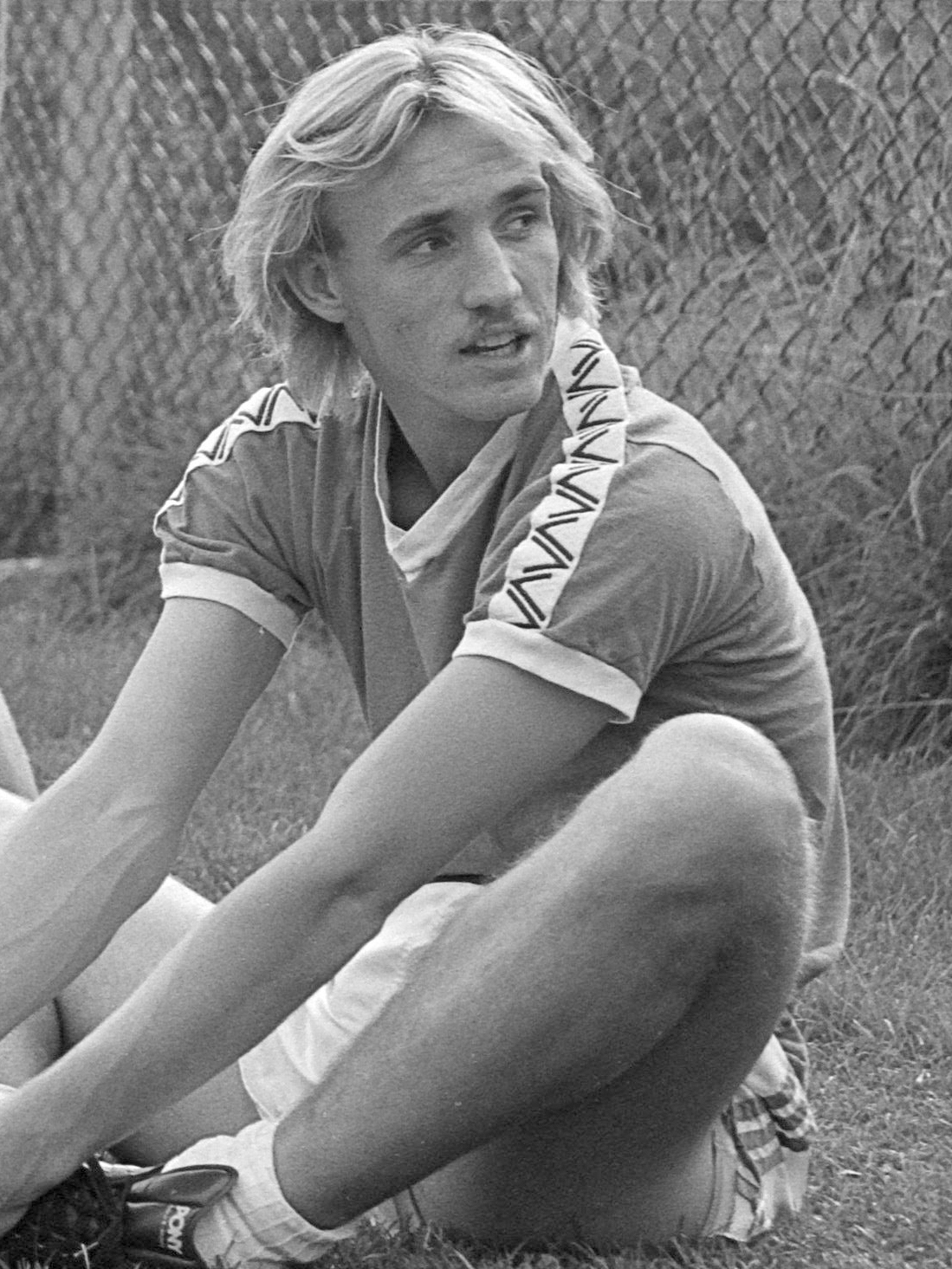 Training van FC Utrecht in verband met de UEFA-cupwedstrijd aanstaande woensdag; Willy Carbo 28 september 1981